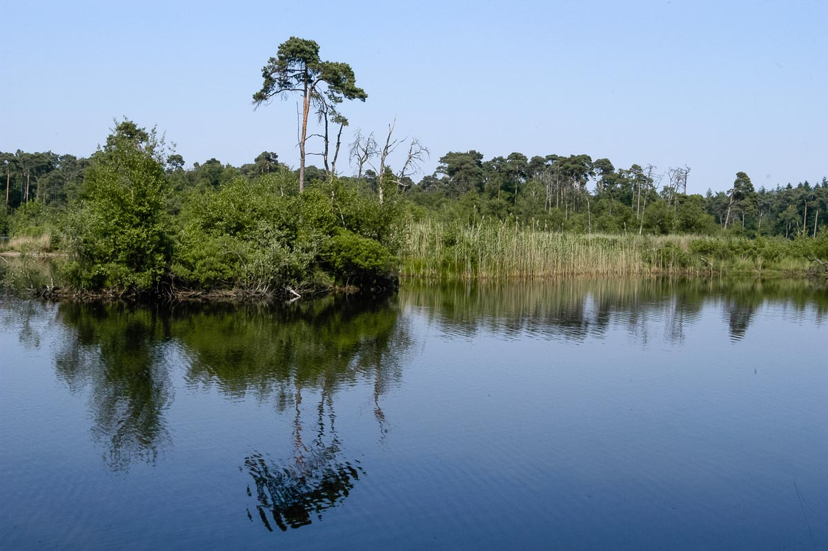 Natuurgebied de Oisterwijkse bossen en Vennen van Natuurmonumenten, Oisterwijk, Noord Brabant, Nederland